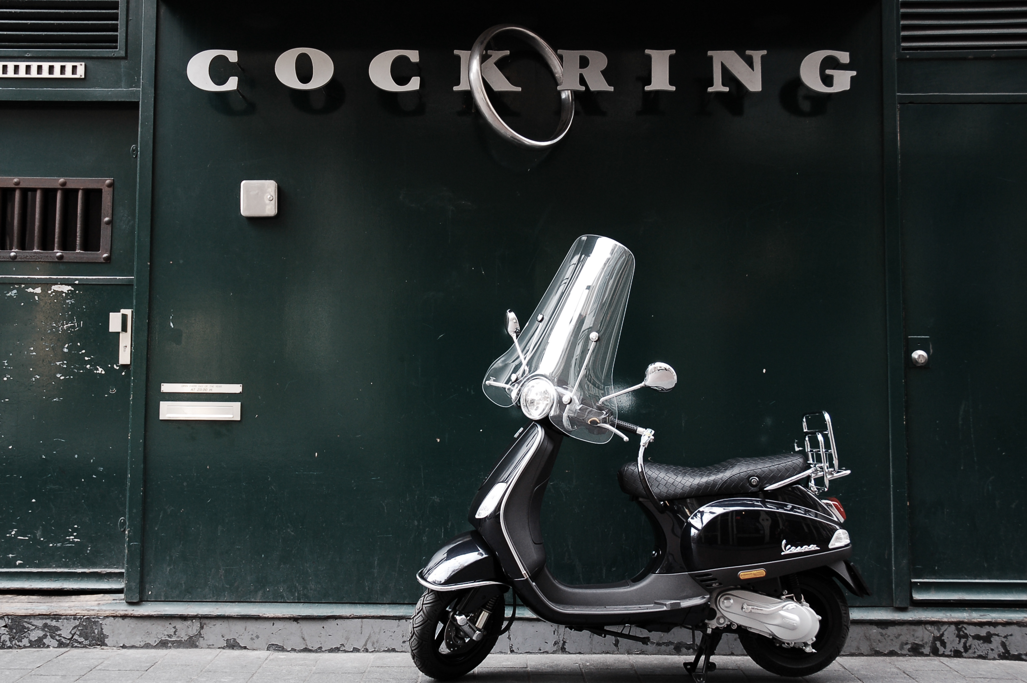 Warmoesstraat street skatch. Amsterdam, Netherlands, Northern Europe.